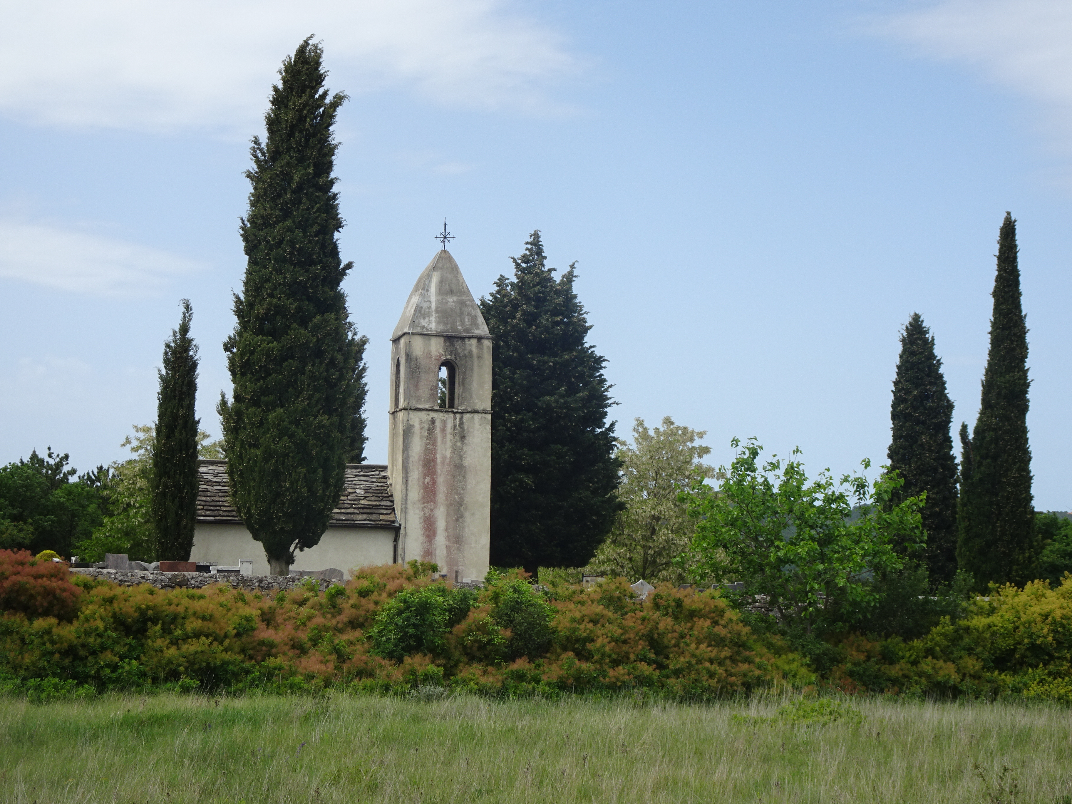 cerkev sv. Kvirika, Sočerga